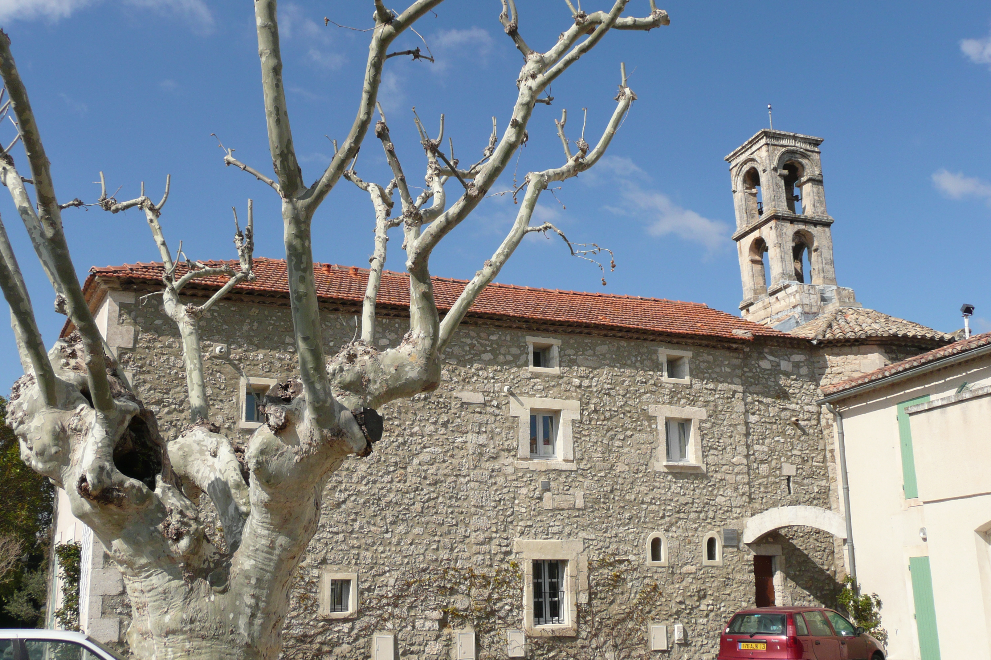 Eglise à Verquières.